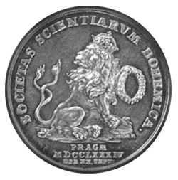 Siegel der Königl. böhm. Geselschaft der Wissenschaften, 1784